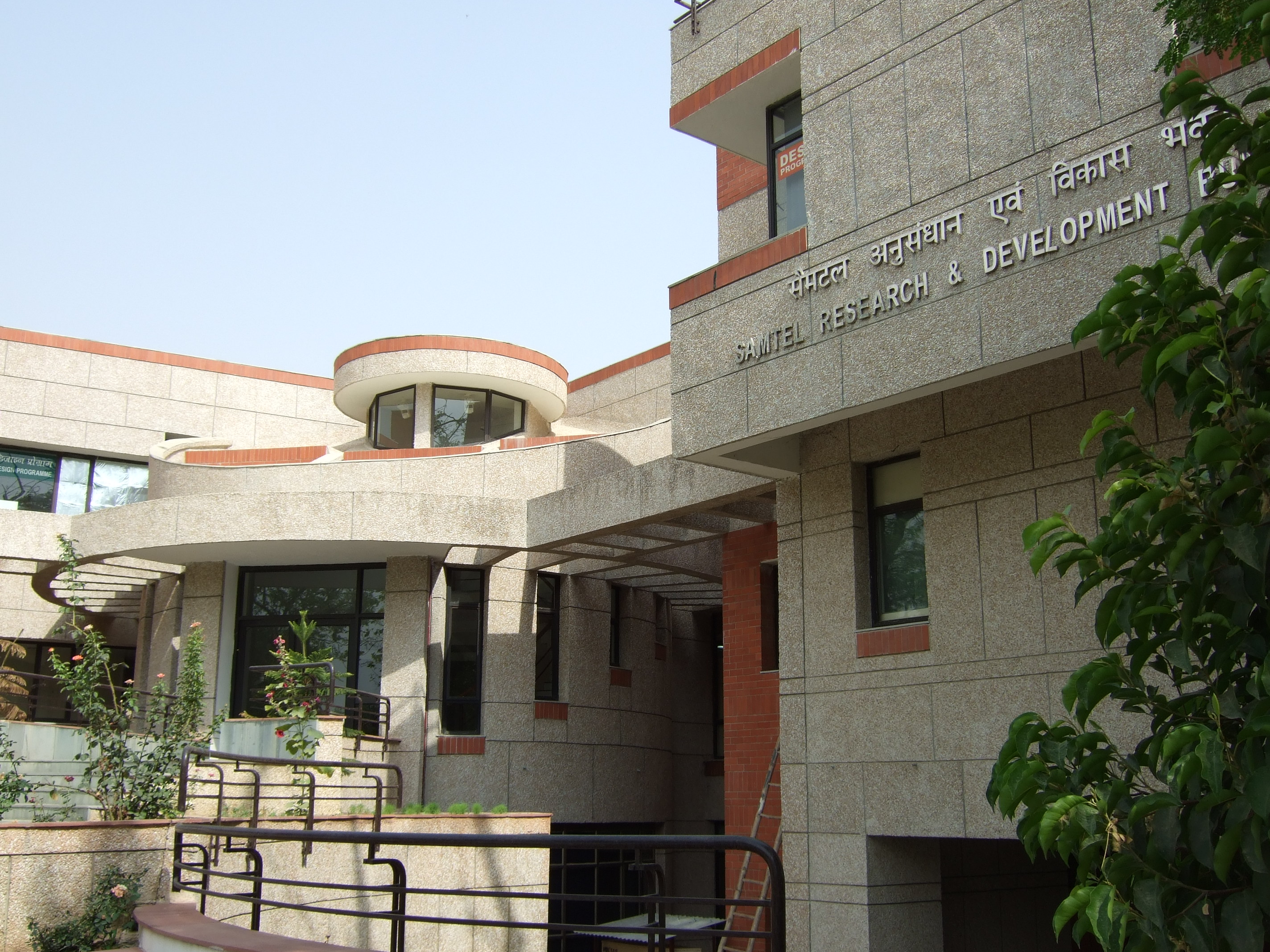 IIT Kanpur